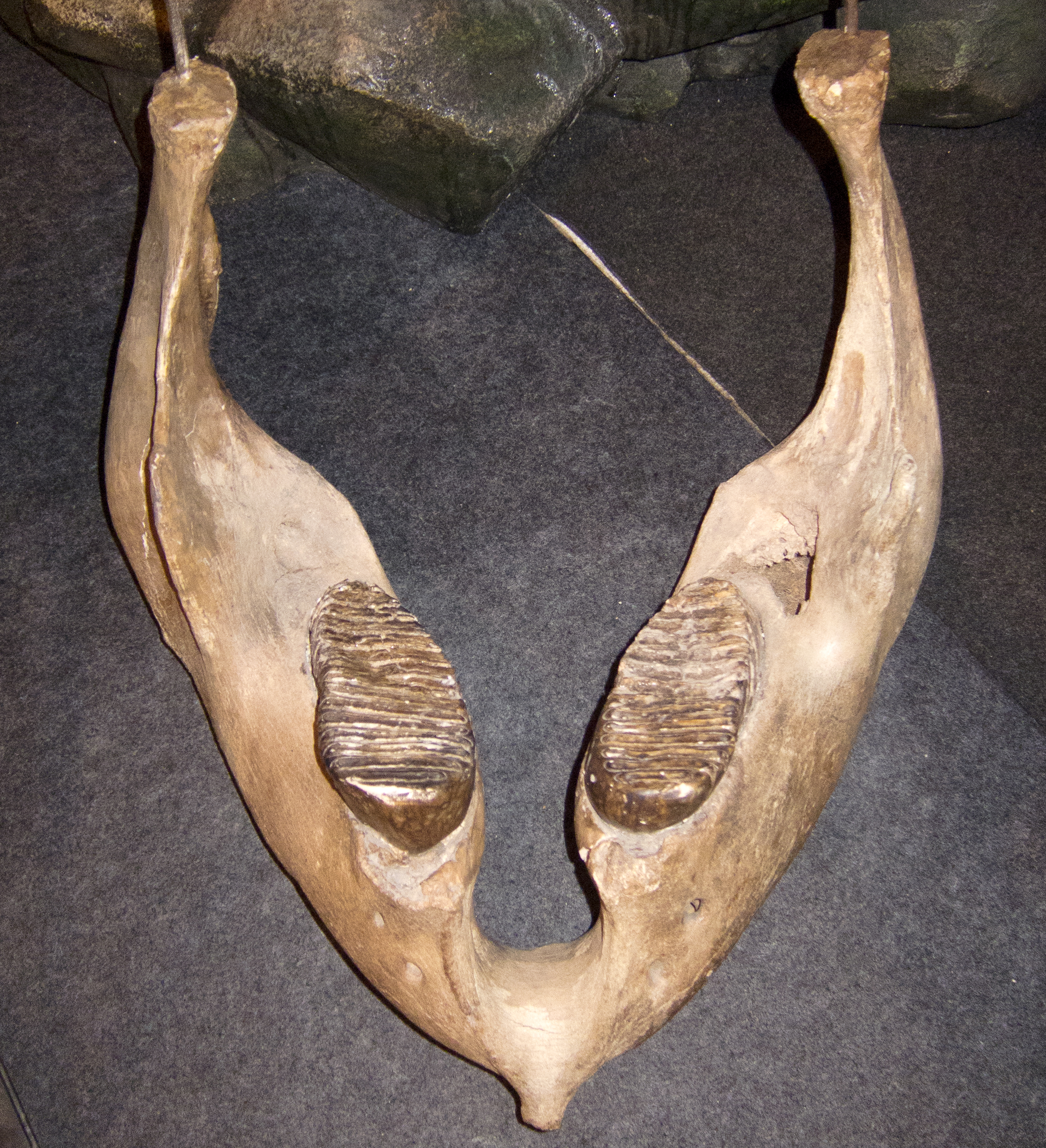 Barcelona 2011